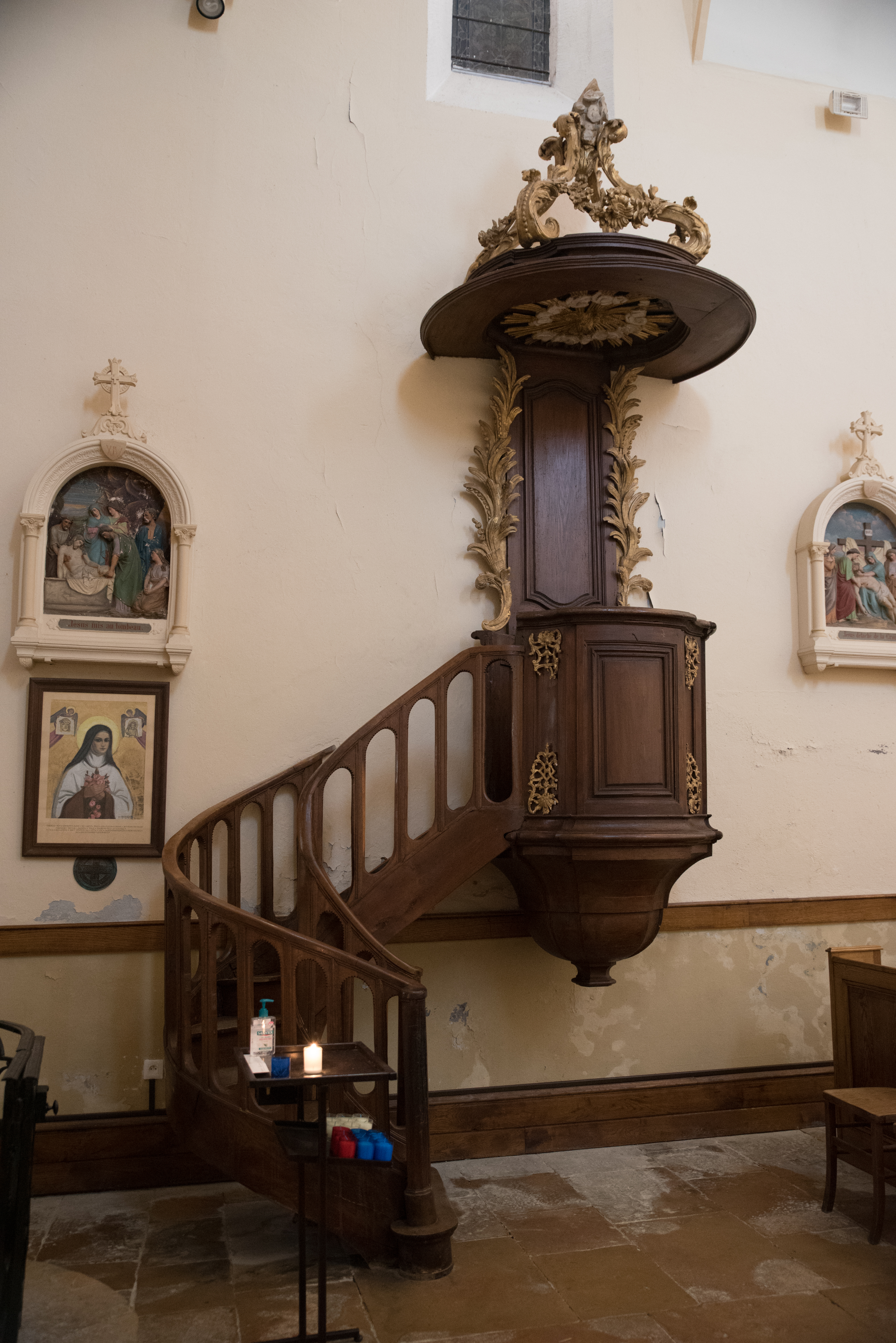 Chaire de l'église Saint-Martin de Salles-Arbuissonnas-en-Beaujolais